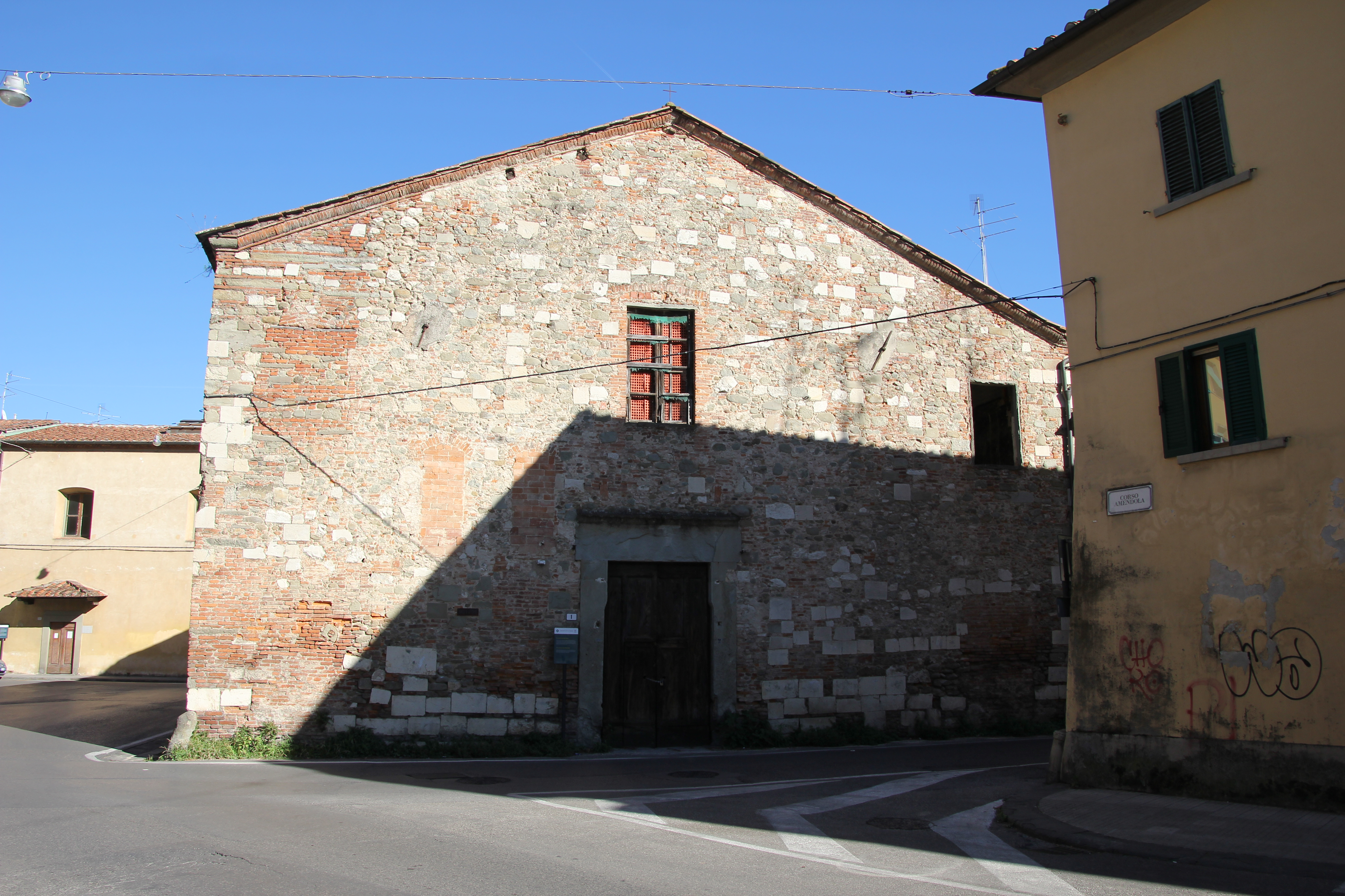 Pistoia, ex chiesa di Santa Maria Nuova